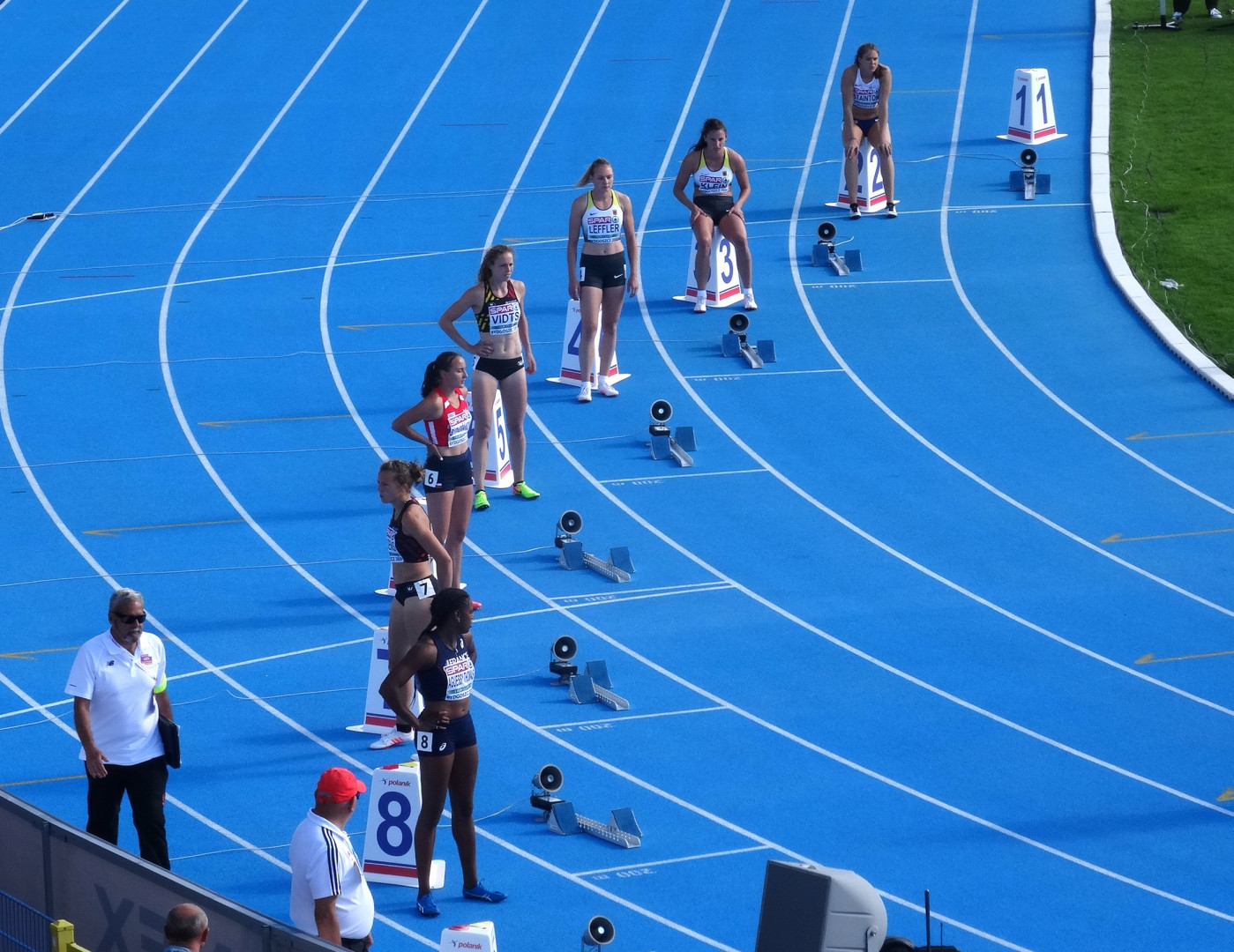 Młodzieżowe Mistrzostwa Europy w Lekkoatletyce U23 w Bydgoszczy 13-16 lipca 2017, siedmiobój kobiet; bieg na 200 m